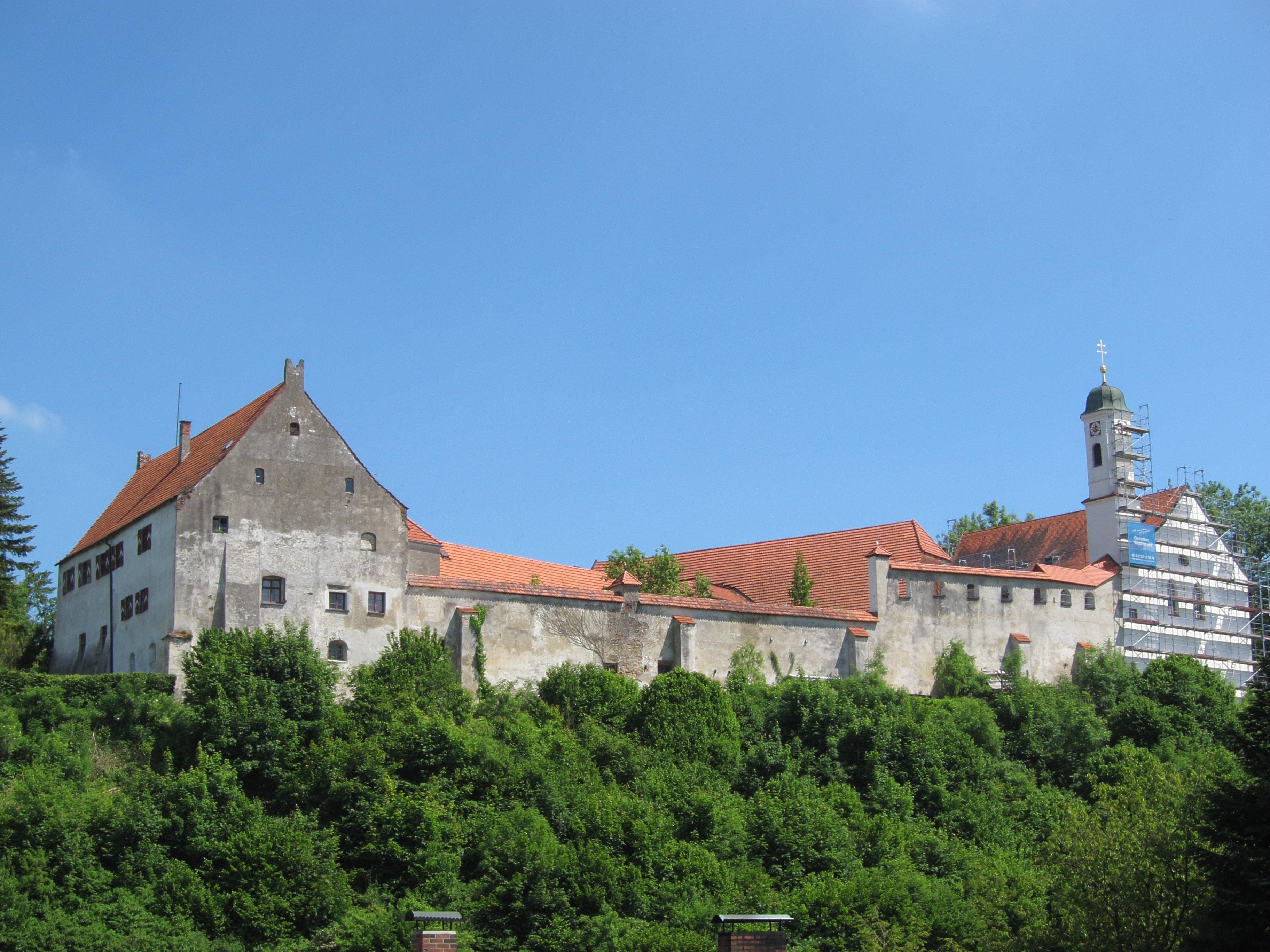 Schloss Burgrain; unregelmäßiger dreiflügeliger Schlossbau; dreigeschossiges Wohn- und Wirtschaftsgebäude mit Satteldach, 19. Jahrhundert; Bergfried aus Nagelfluhquadern, teilweise abgetragen, 12./13. Jahrhundert; Schildmauer, 16. bis 19. Jahrhundert.